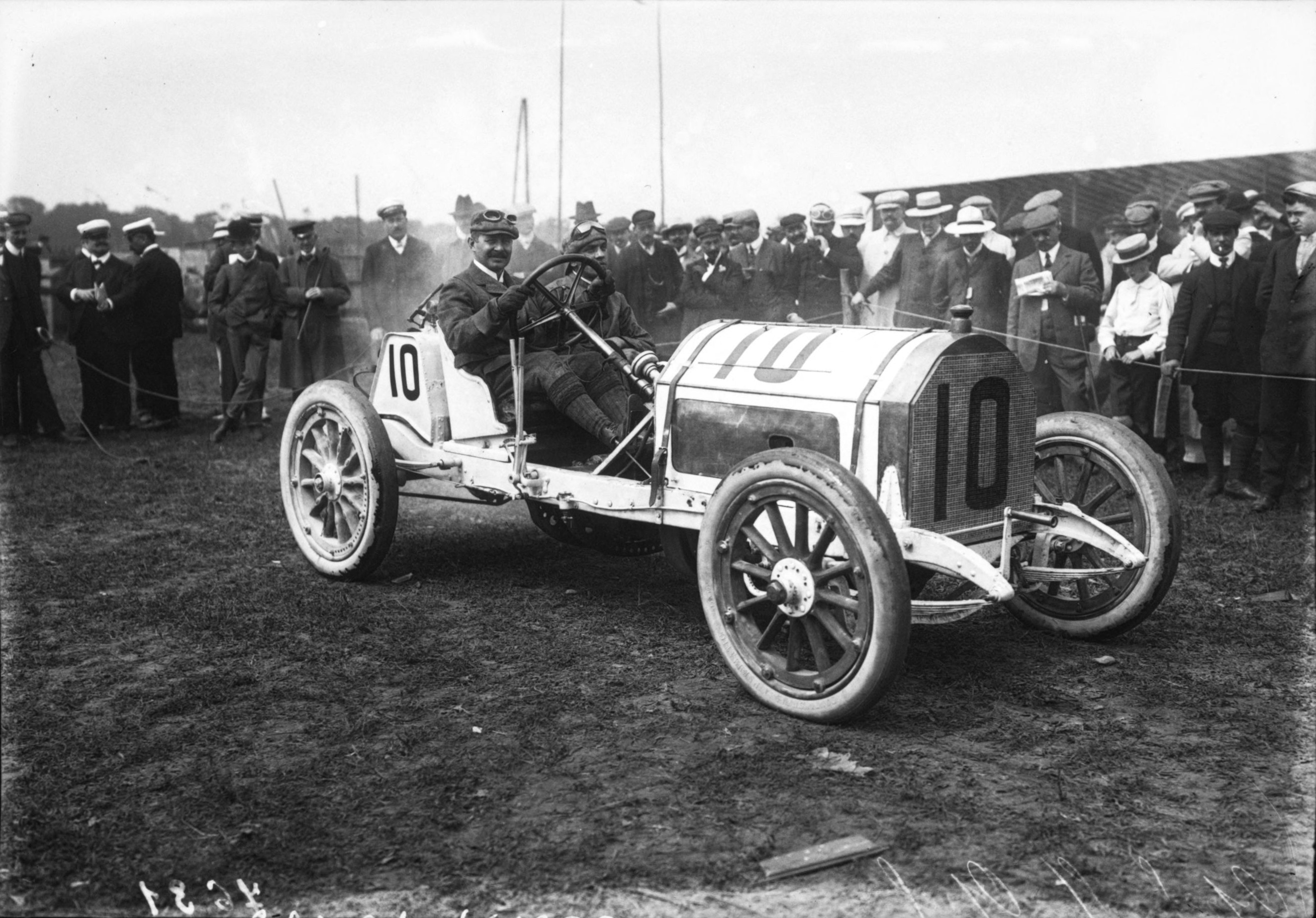 Friedrich Opel au volant d'une Opel au Grand Prix de l'ACF 1908, à Dieppe